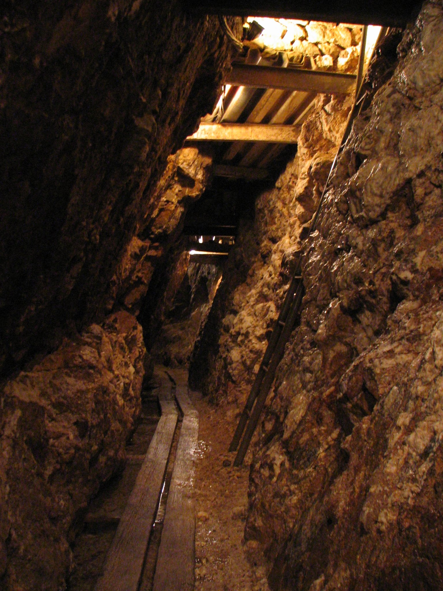 Josephistollen (tiefer Stollen) des mittelalterlichen Silberbergwerks Suggental